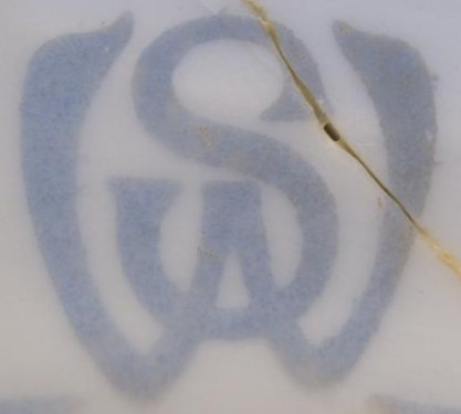 Emblem des Sanatorium Wienerwald ca. 1903/04. Detailaufnahme einer Tellerscherbe des ursprünglichen Hausgeschirrs (1. Serie, Stempel kobaltblau, produziert ~1903/04).